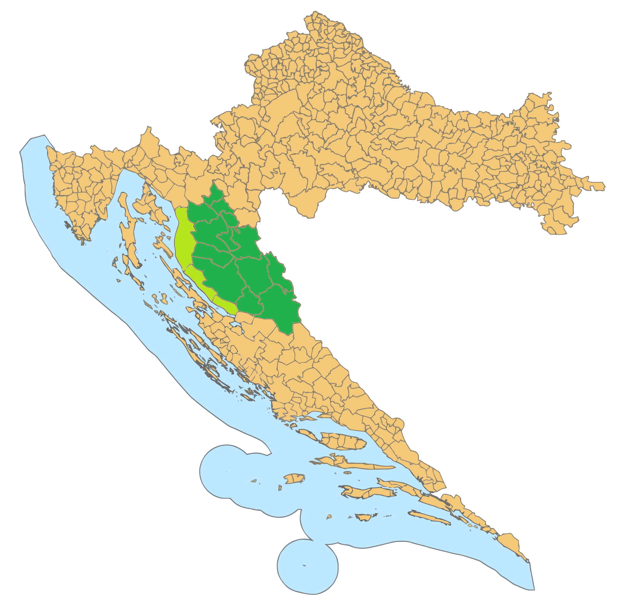 Lika (zeleno) i dio Hrvatskog Primorja (svijetlo zeleno) na karti Hrvatske